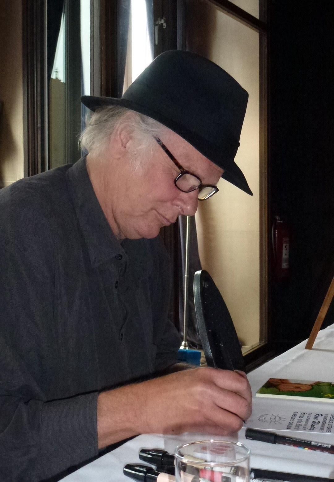 Nederlandse striptekenaar. Gefotografeerd tijdens Strips op de markt in Gouda